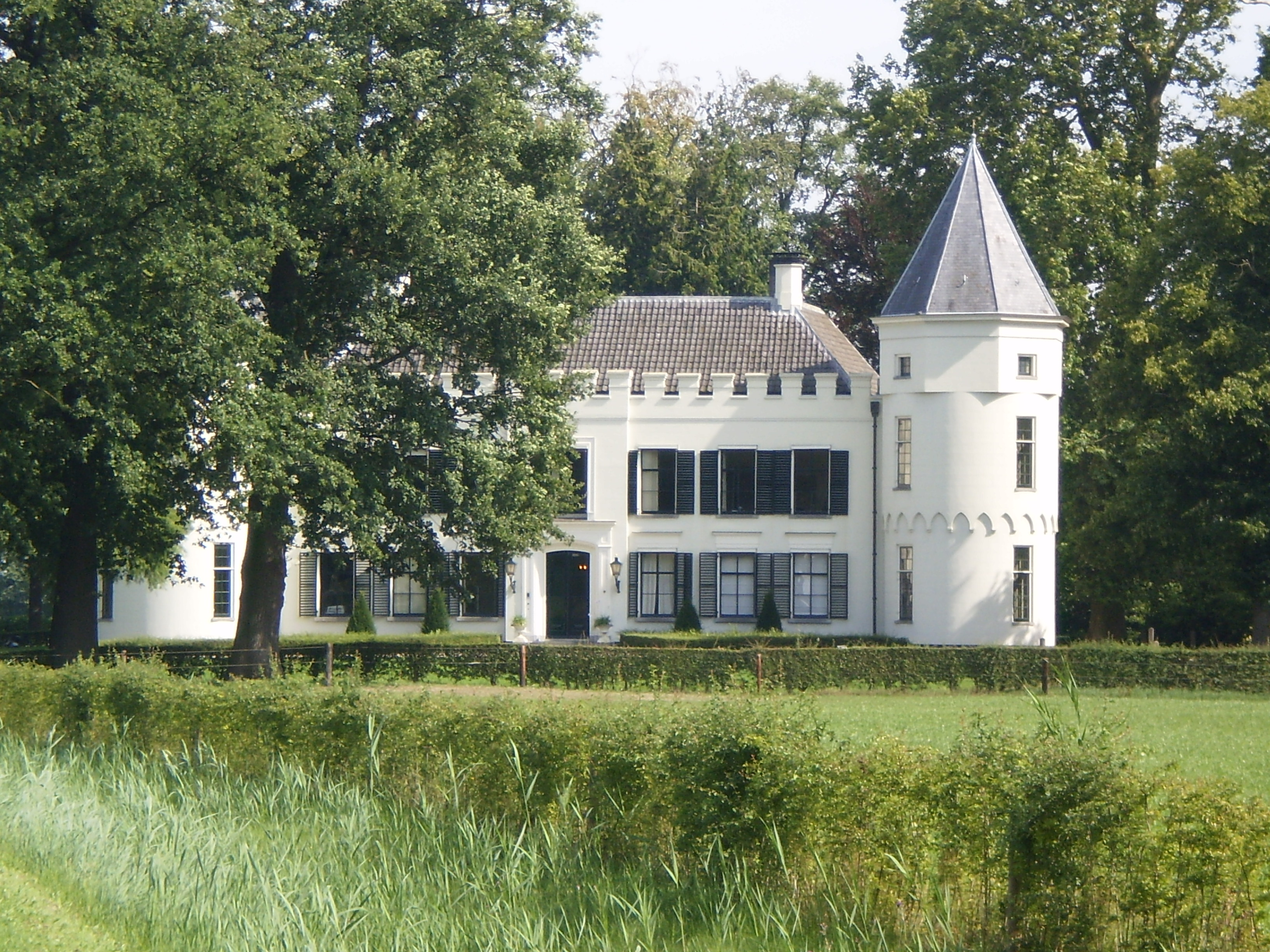 Ofbyld oanbean troch swarte Kes op 15 augustus 2009